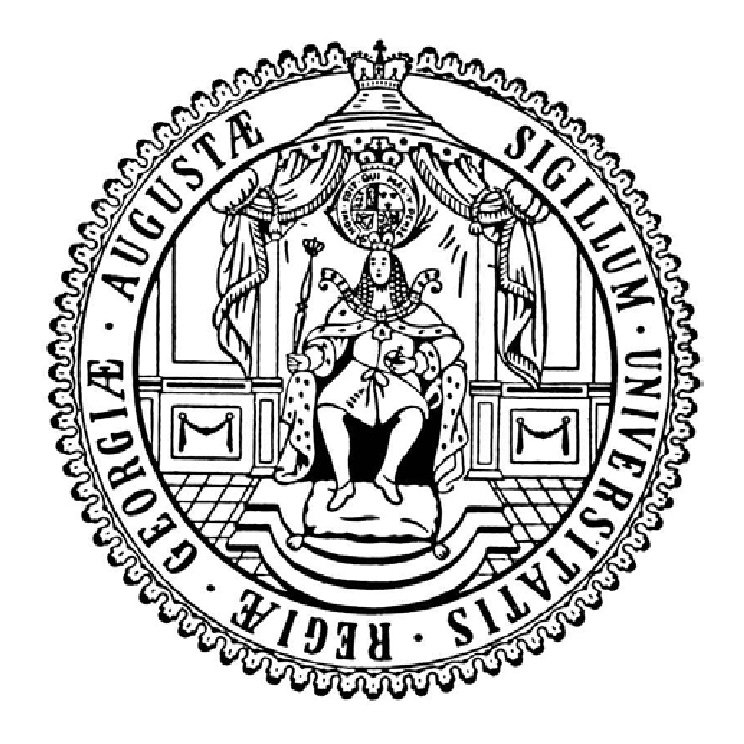 Siegel der Georg-August-Universität Göttingen 1737 / Seal of the Göttingen University 1737